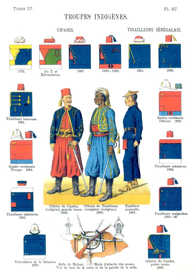 Planche 87 du tome IV des « Uniformes de l'armée française », par le docteur Constant Lienhart et le professeur René Humbert. Troupes indigènes, cipahis et tirailleurs.